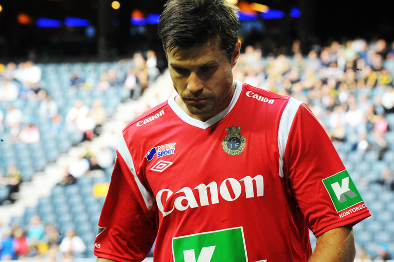 Emil Hedvall